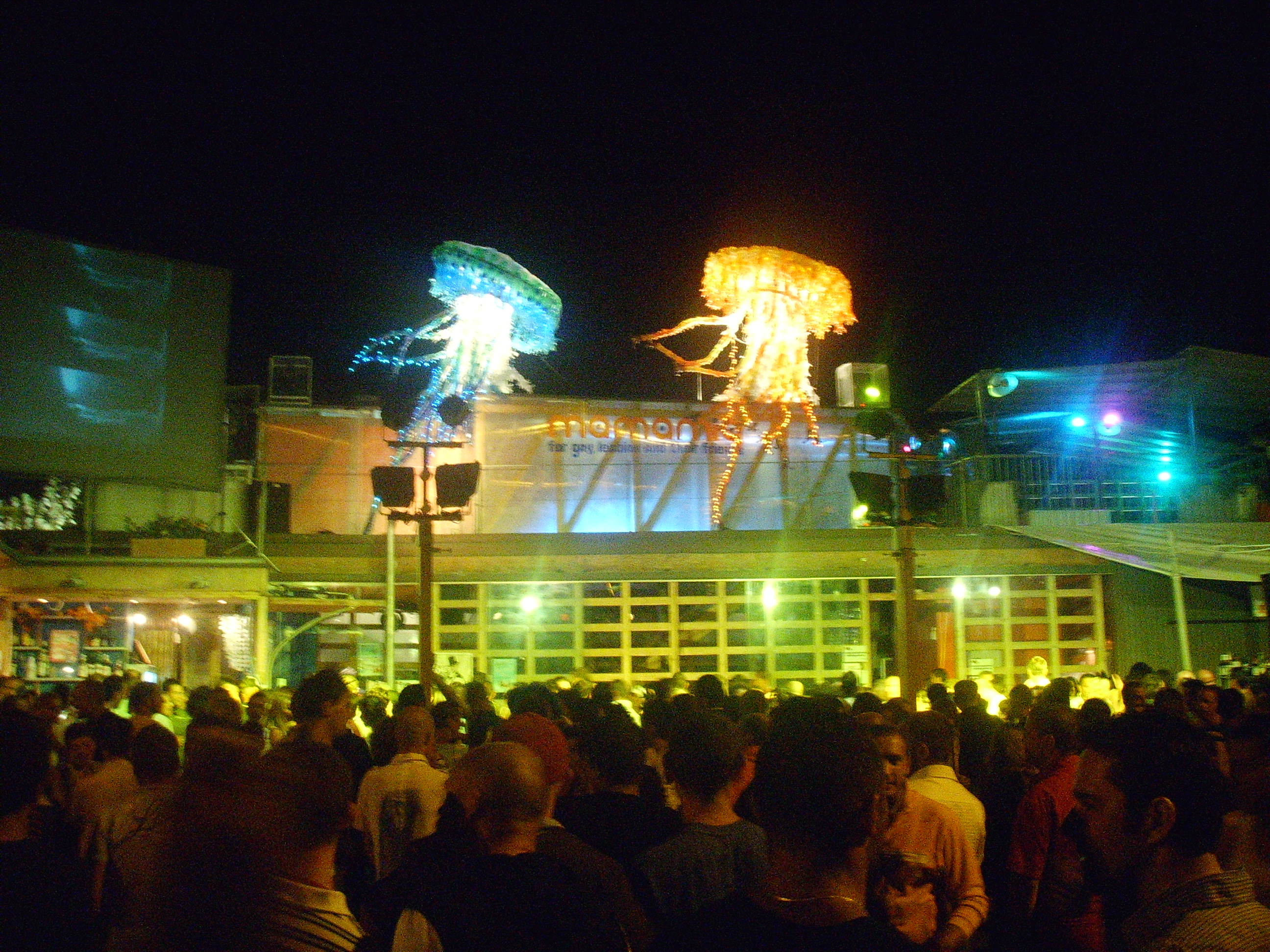 Torre_del_Lago,_Mama mia in Viareggio, italy